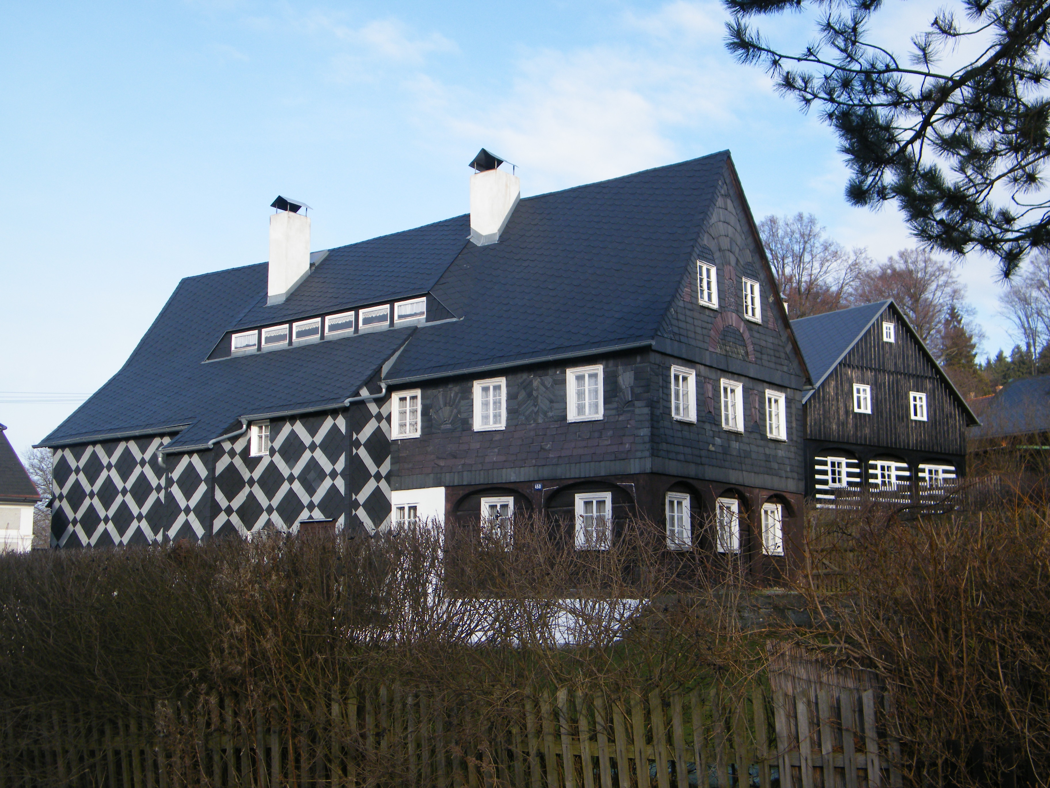 Chalupa čp. 450 v Mikulášovicích